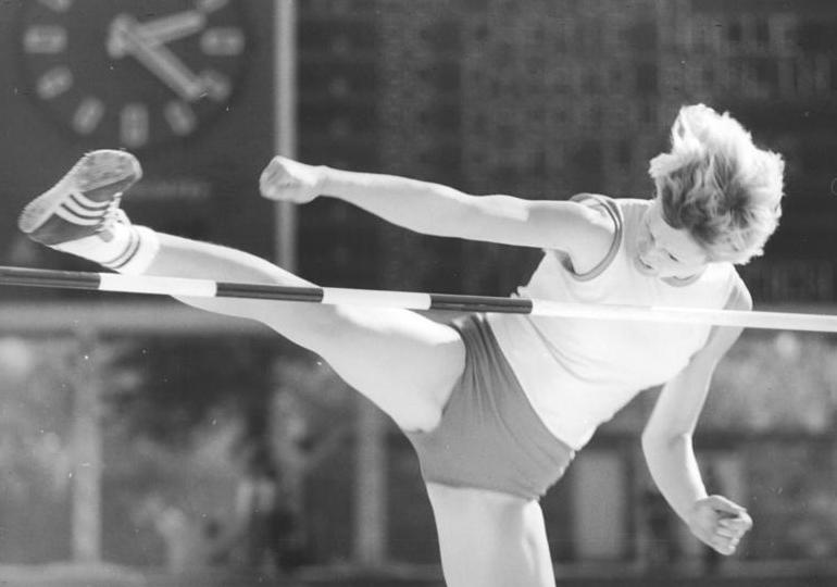 Rita Kirst ADN-ZB Demme 21.9.74-str-Erfurt: Endrunde um die Club-Pokale des DVfL. 1,90 m übersprang Rita Kirst vom ASK Potsdam im Erfurter Georgi-Dimitroff-Stadion.